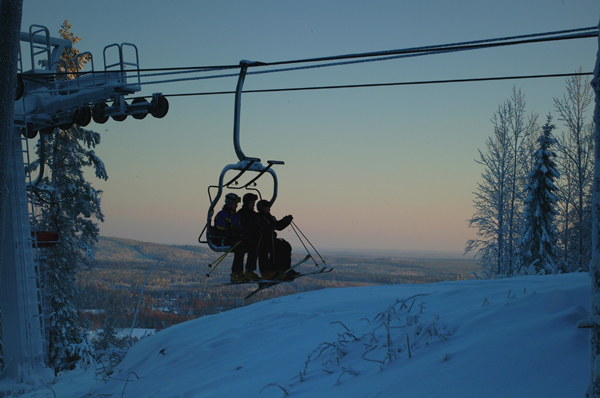 Toppen på Kungsberget vid avstigningen på sittliften.